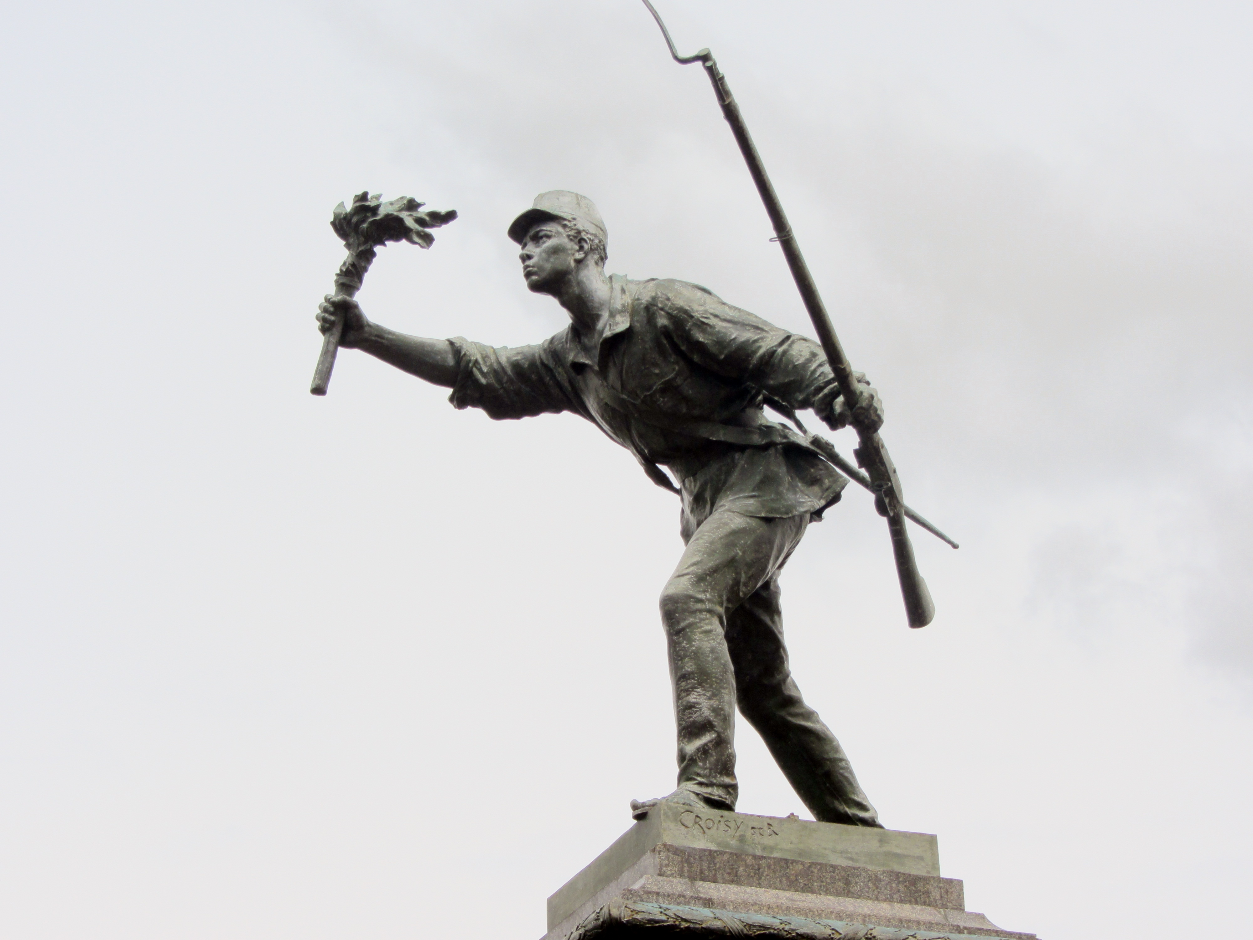 Estatua de Juan Santamaía, Alajuela, Costa Rica